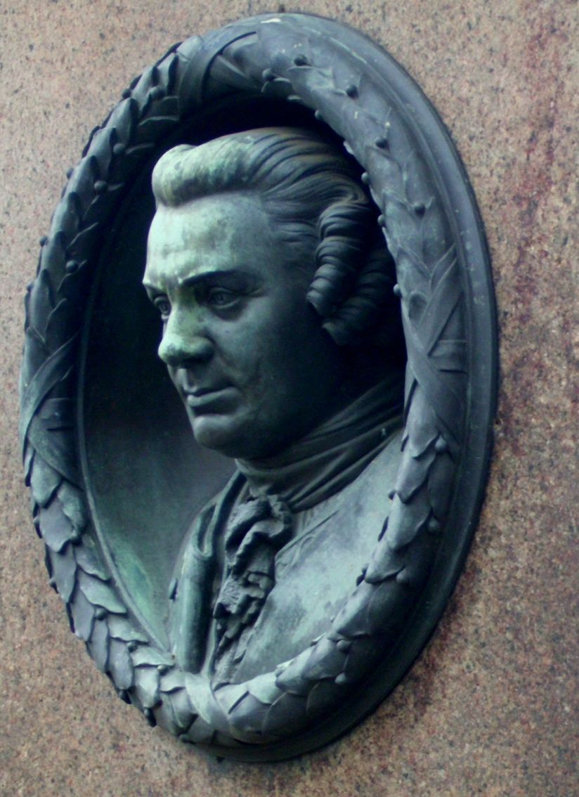 Büste von Hans Carl von Winterfeldt an seinem Grabmal auf dem Invalidenfriedhof Berlin